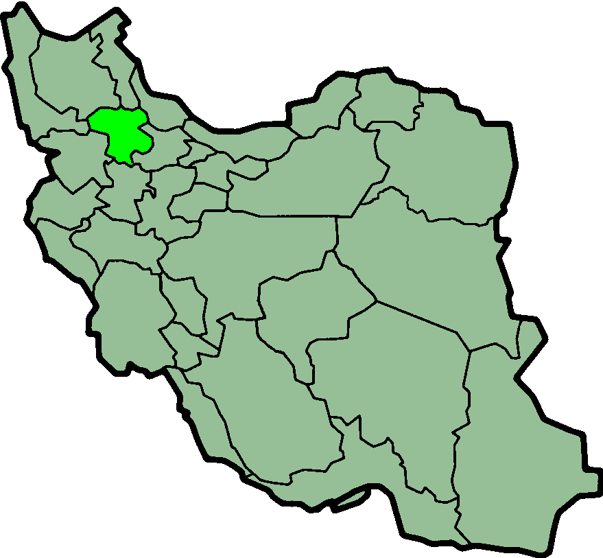 Province of Zanjan, Iran